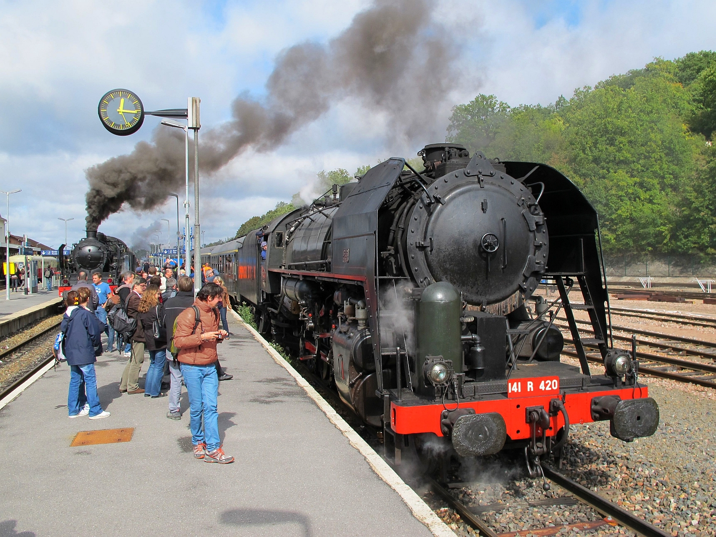 Deux trains spéciaux à vapeur de l'AJECTA attendent le départ en gare de Longueville le 18 septembre 2011.